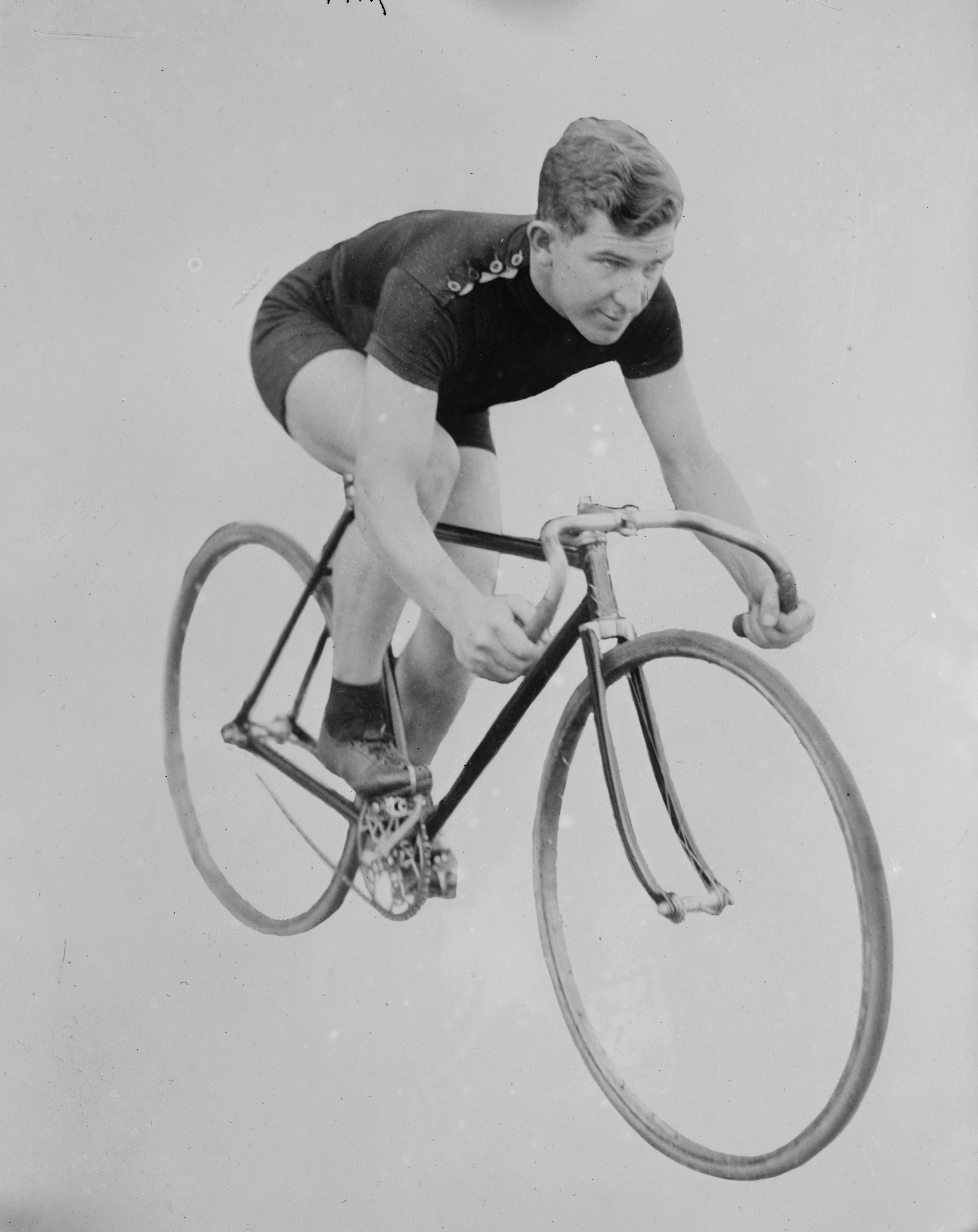 Jackie Clark, 12/4/12